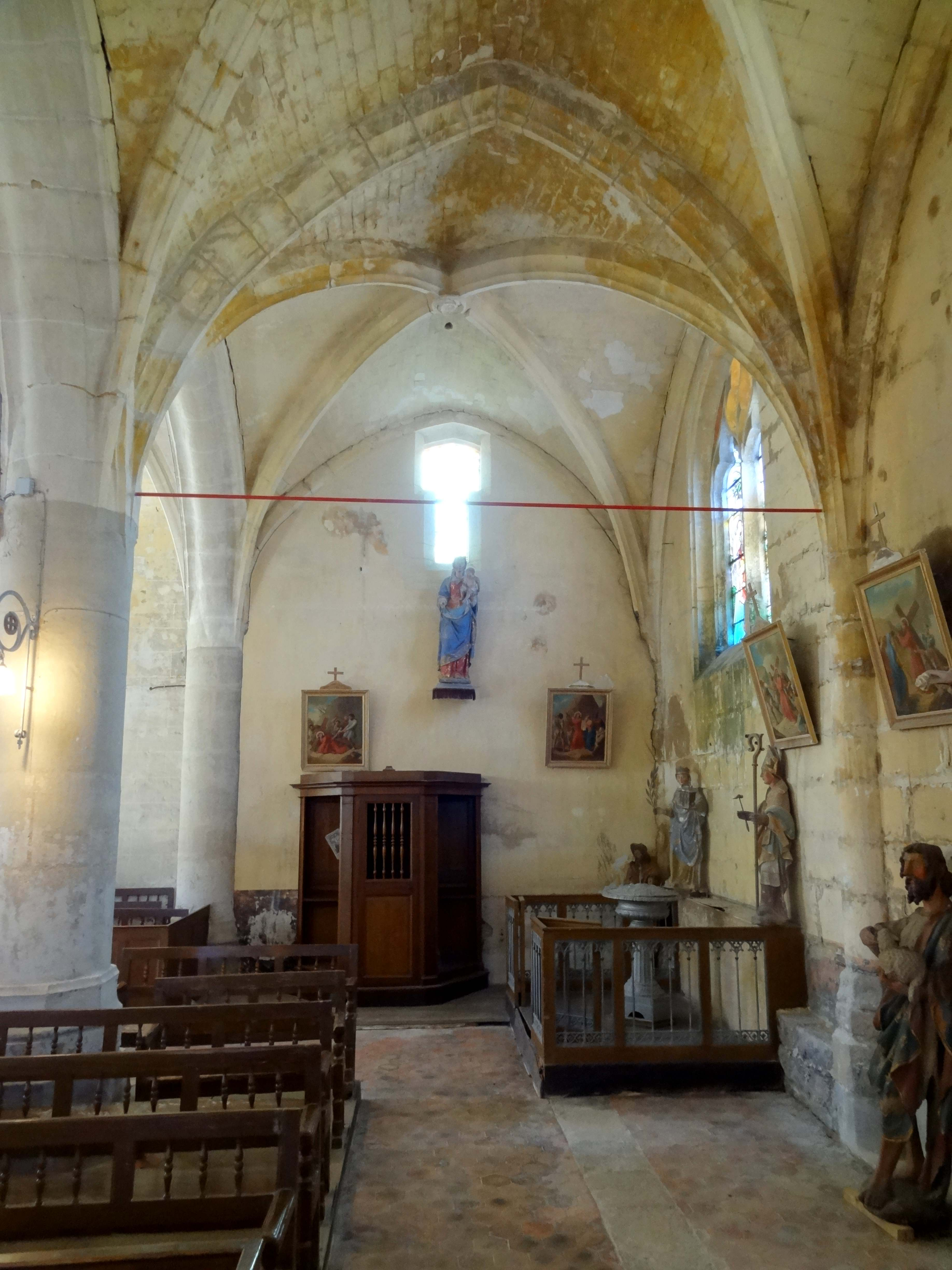 Intérieur de l'église - voir titre.